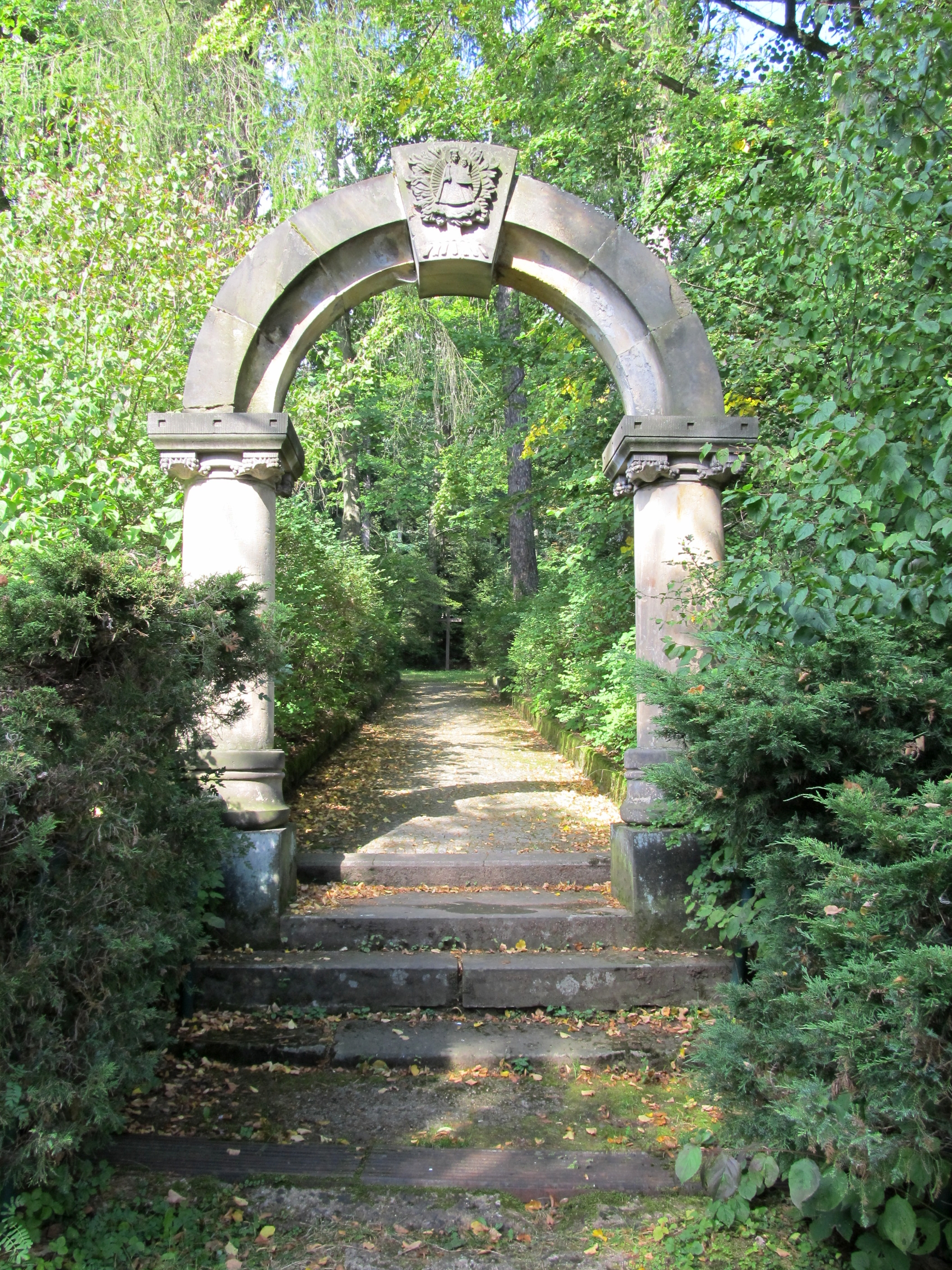 Kaple - soubor kapliček a Božího hrobu (Malé Svatoňovice), Mariánský sad, Malé Svatoňovice